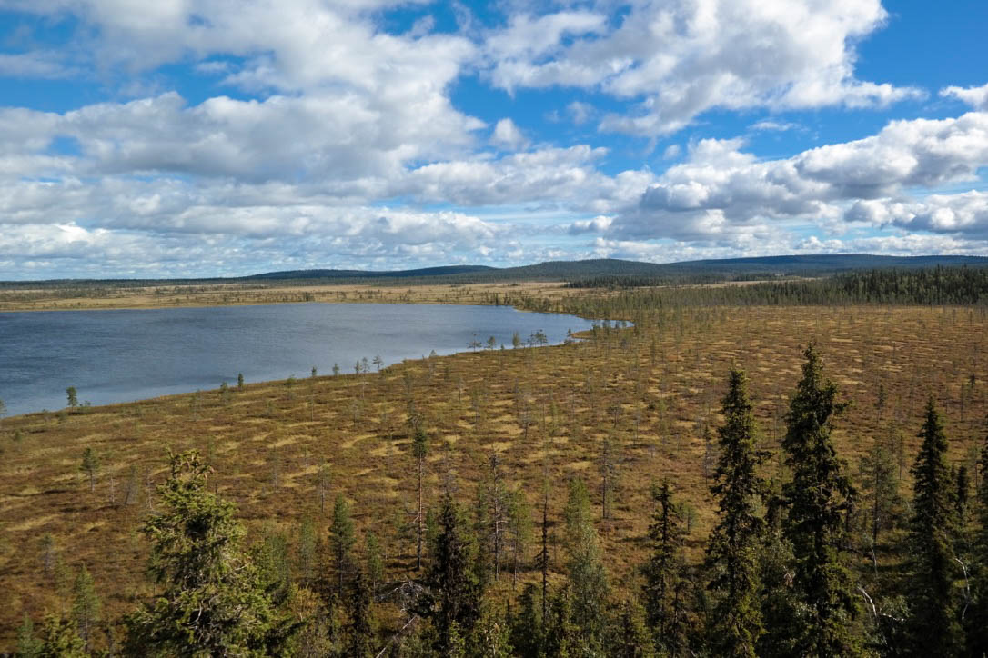 Vue sur le lac de Muddus et les tourbières environnantes depuis la tour d'observation du parc